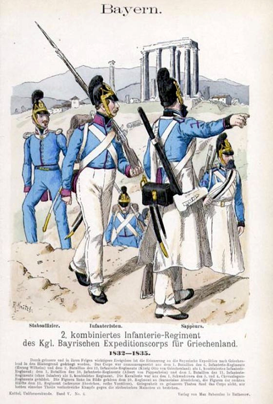 Иллюстрация Рихарда Кнотеля